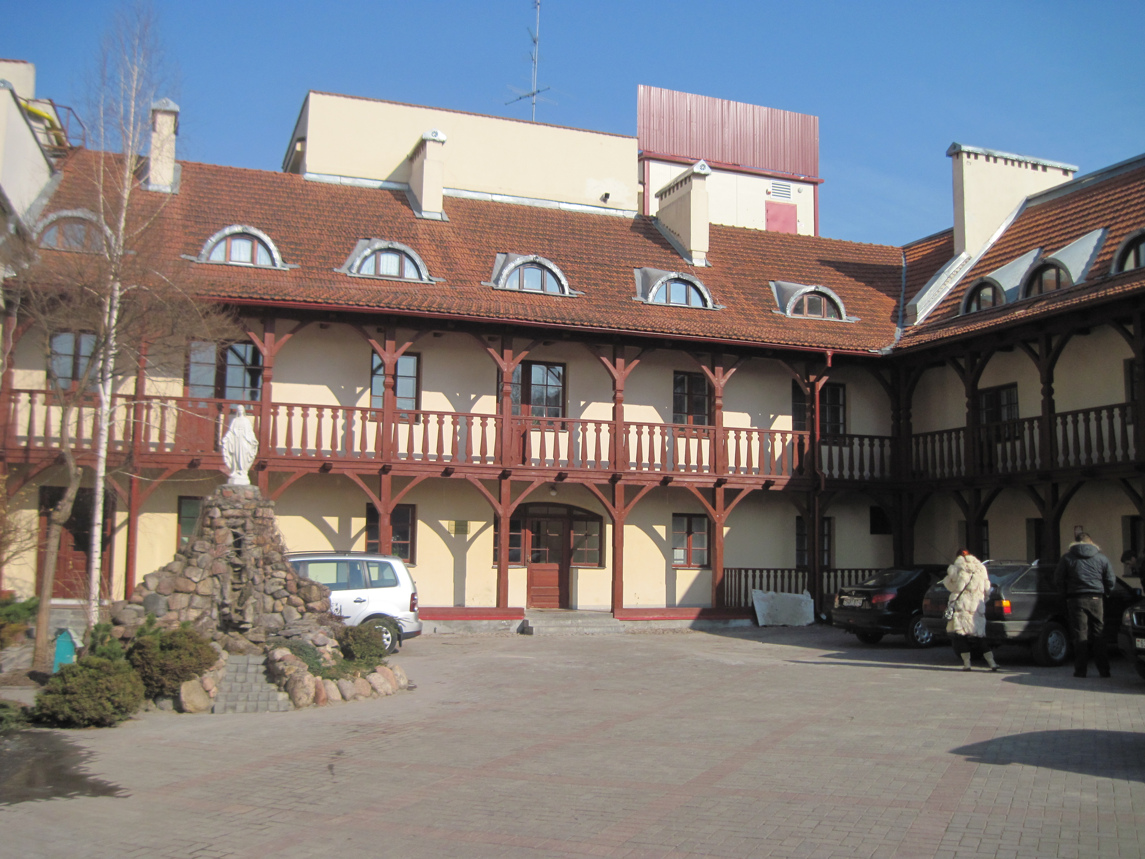 Курыя Гродзенскай дыяцэзіі. Унутраны дворык. Гродна, вул. К. Маркса, 2.